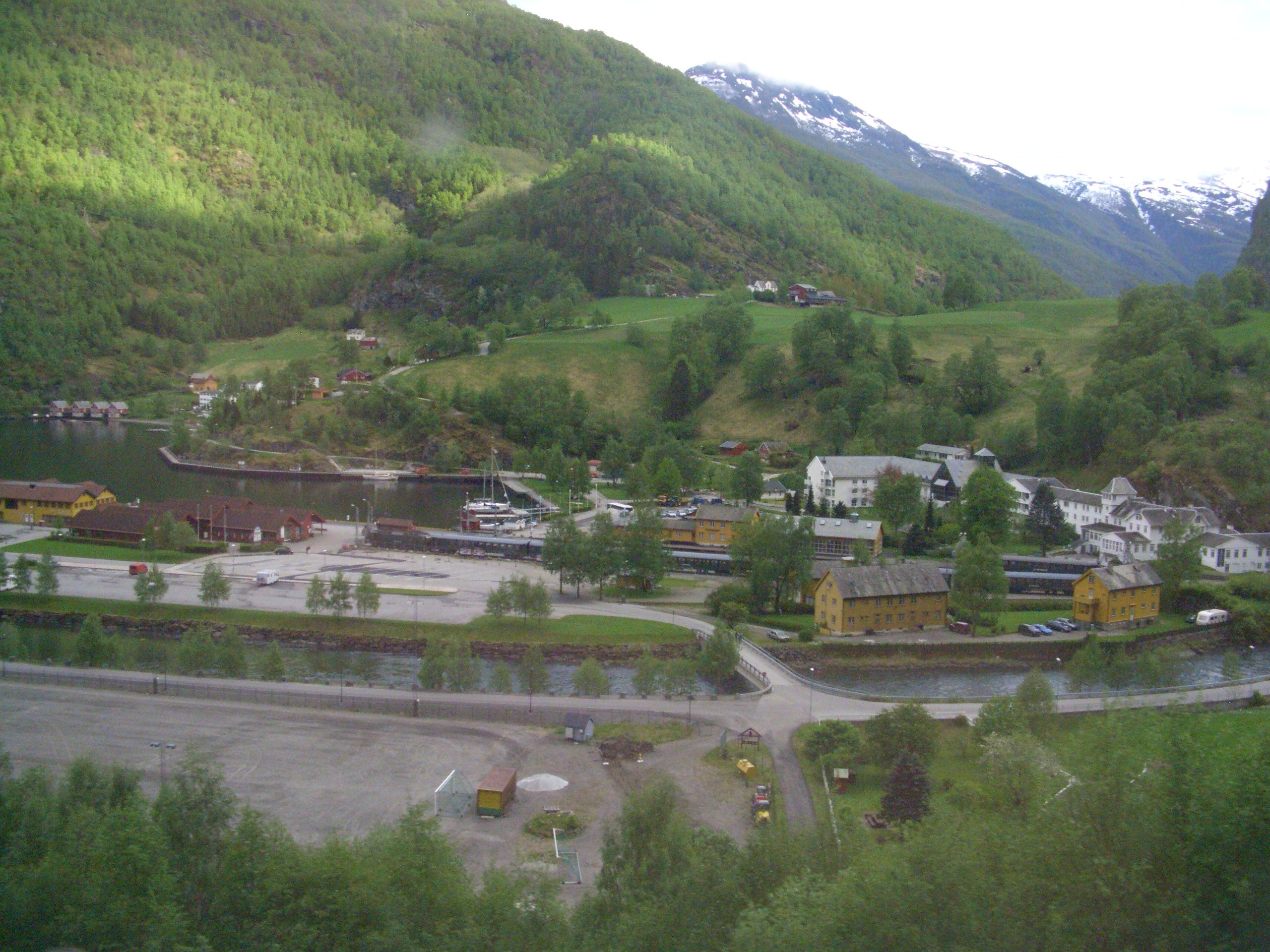 Flåm